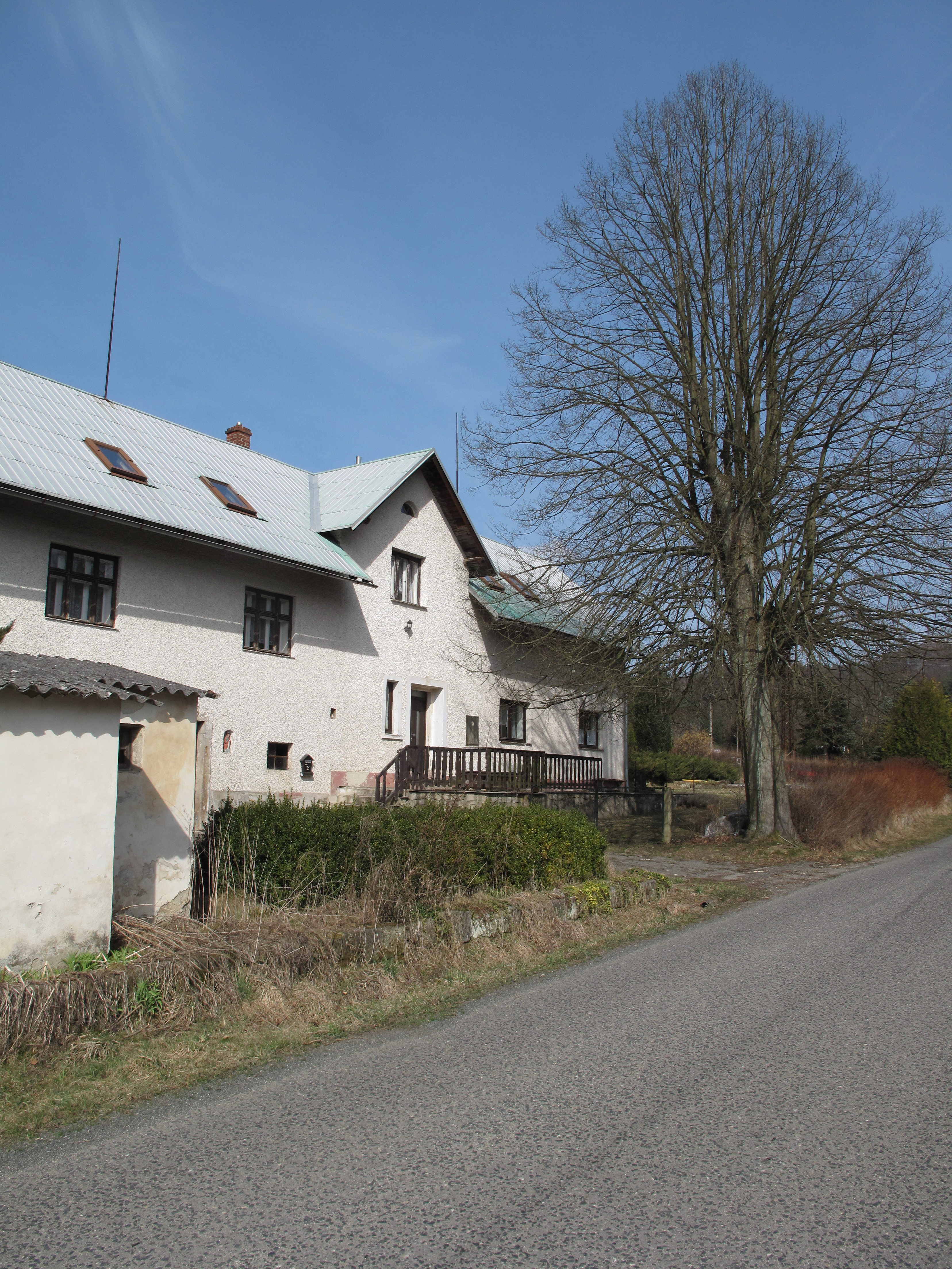 Dům v Dolánkách. Okres Liberec, Česká republika.